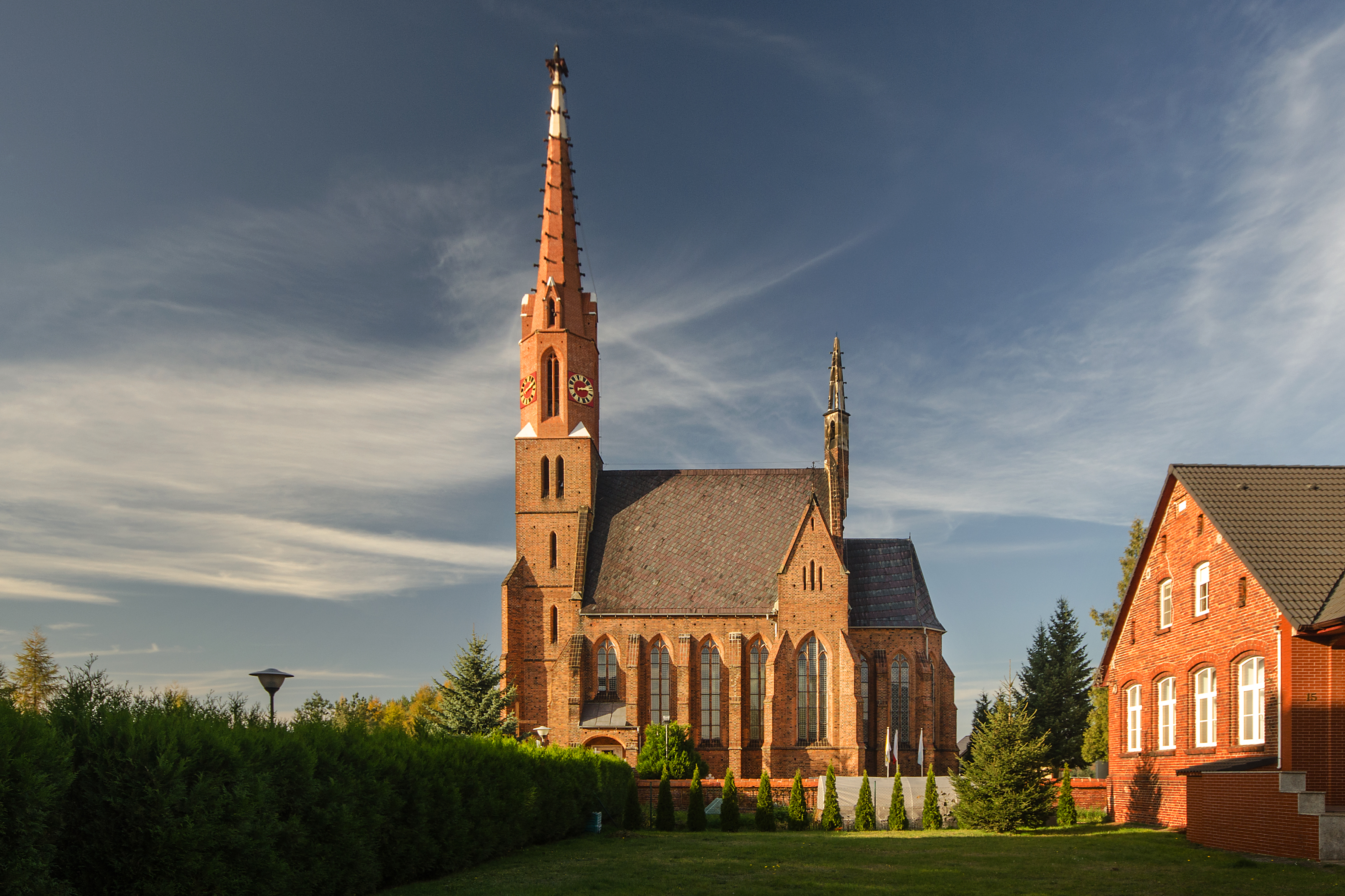 Chrząstawa Wielka, kościół par. p.w. Niepokalanego Poczęcia NMP, 1864